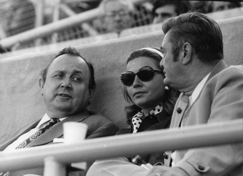 München, Olympische Spiele 1972 Bei den Leichtathletik - Wettbewerben im Olympiastadion auf der Ehrentribühne: Bundesminister Hans-Dietrich Genscher und der nordrhein-westfälische Inneminister Willy Weyer